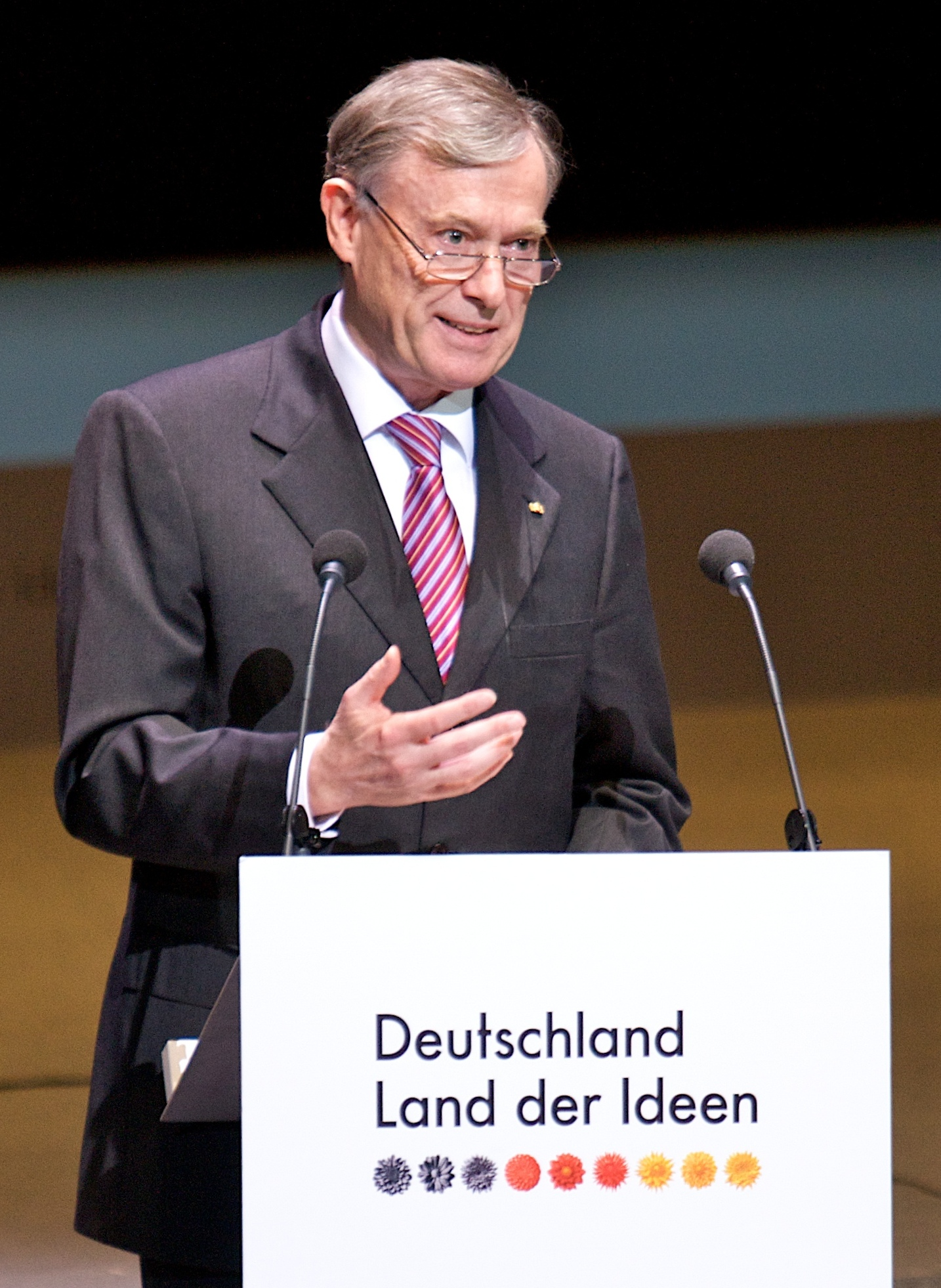 Schirmherr der Initiative "Deutschland – Land der Ideen" Bundespräsident Horst Köhler